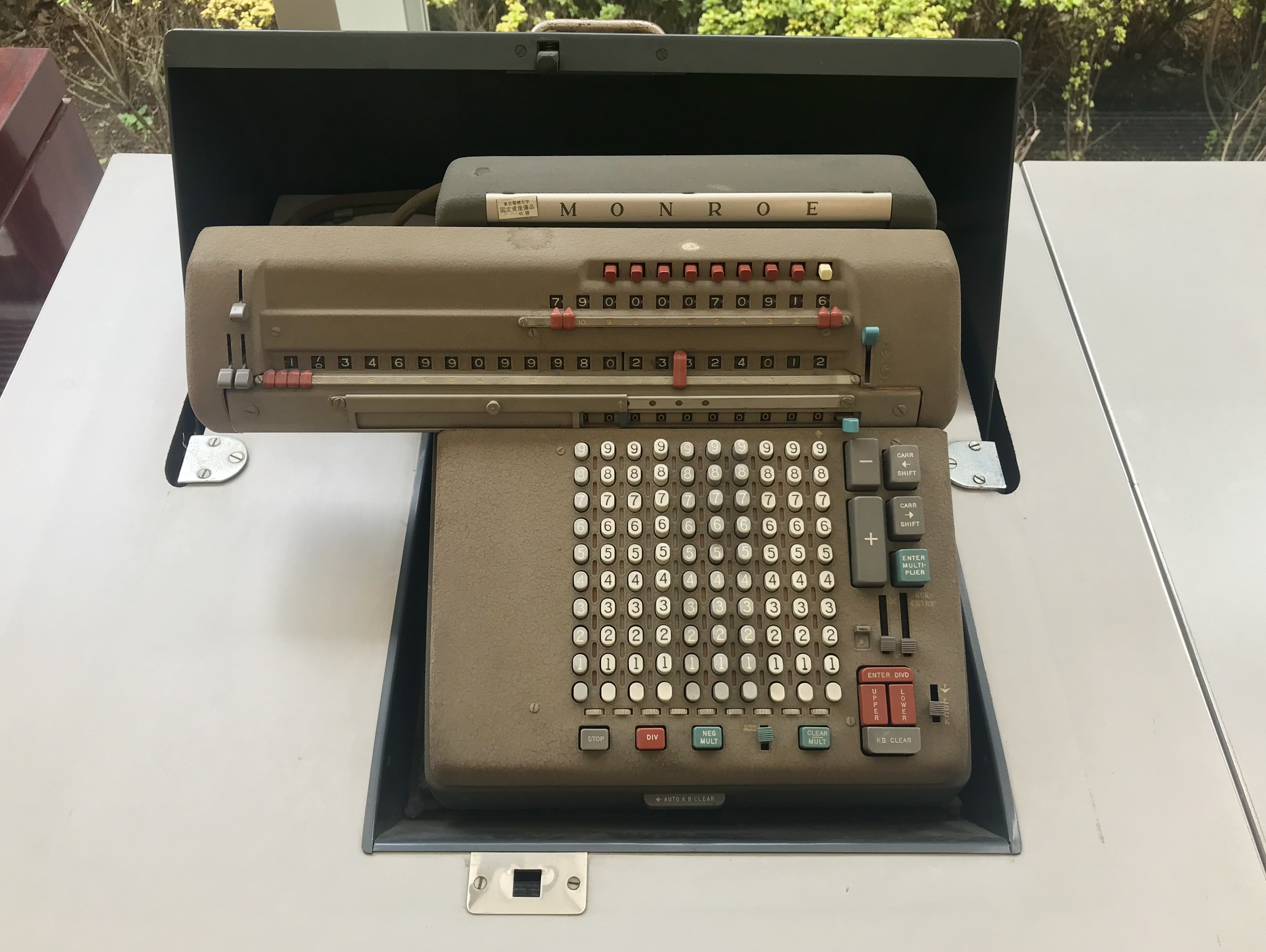 東京電機大学収蔵品